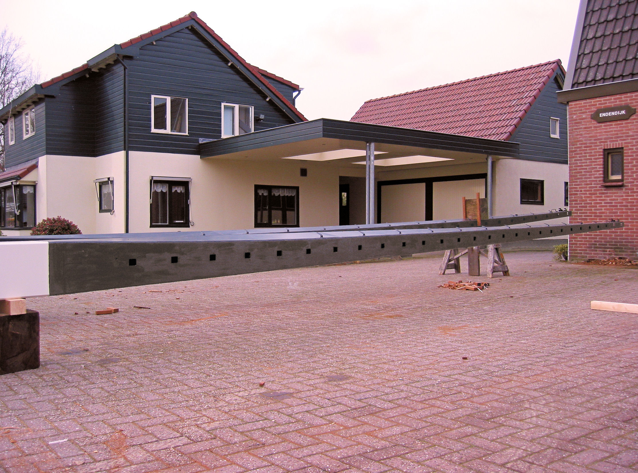 roeden met porring van de Concordia molen te Ede